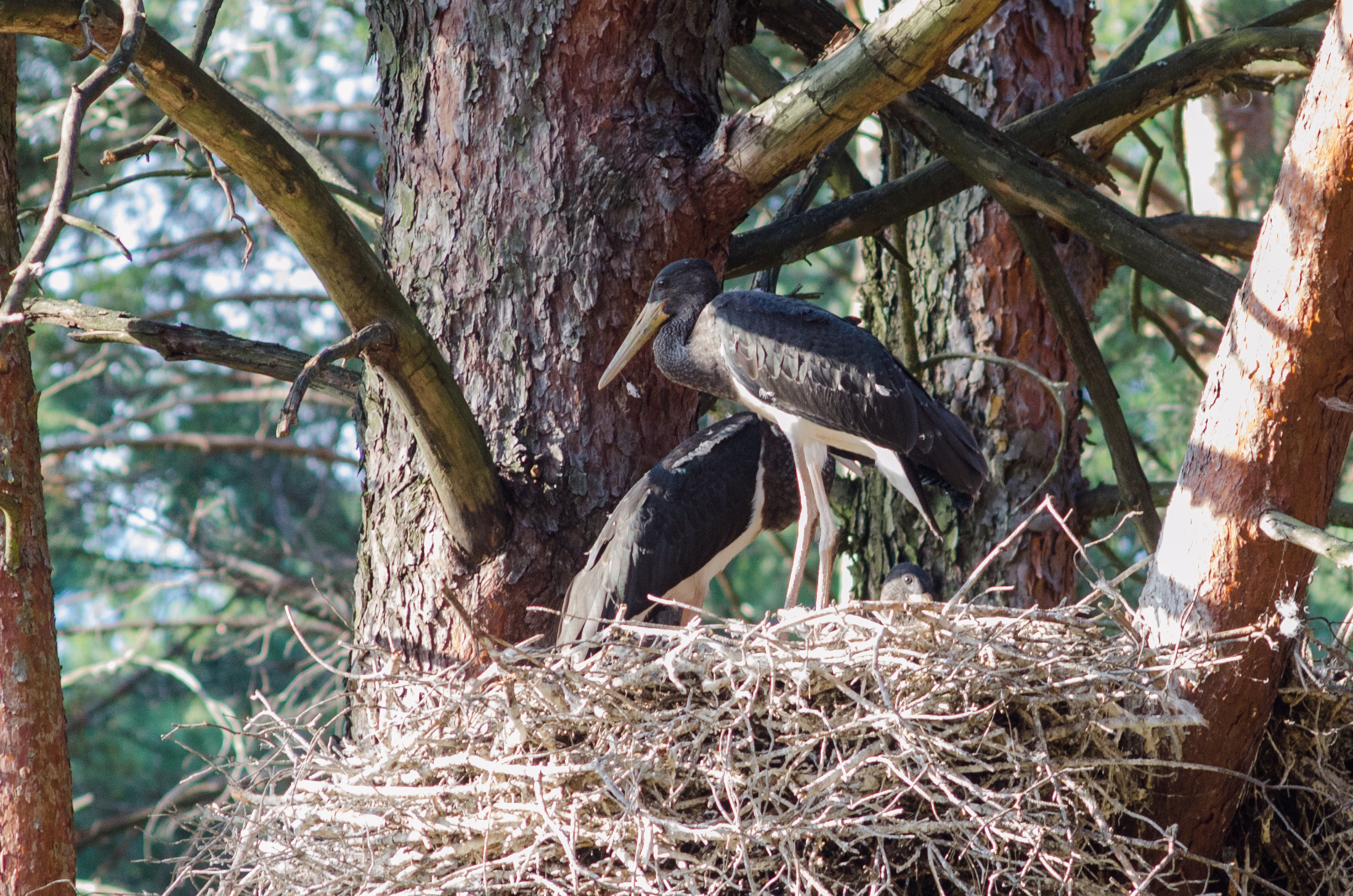 Міжрічинський, міжріччя Дніпра та Десна на території Козелецького та Чернігівського районів